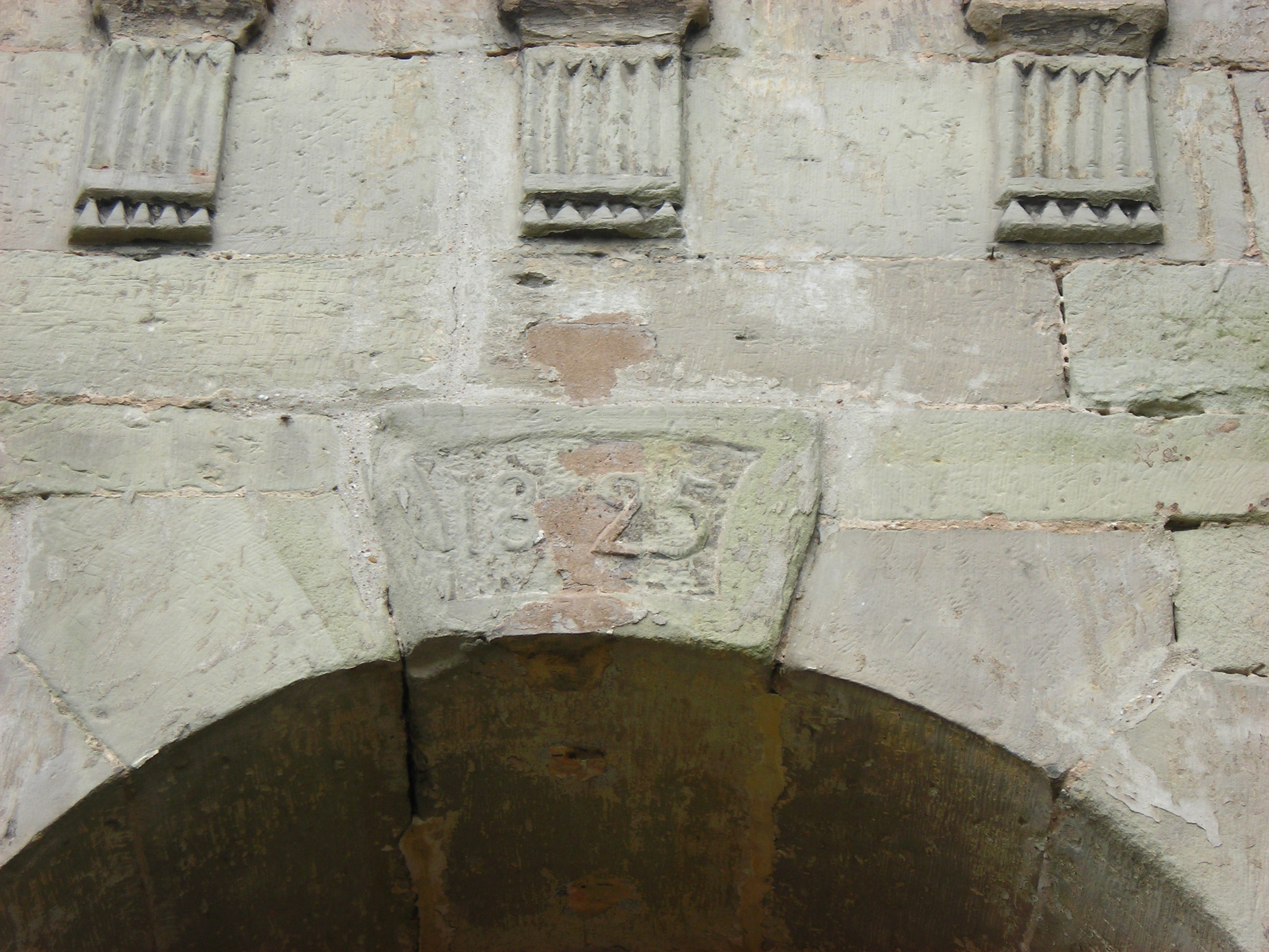 Tympan de l'église St. Brice de Falck (France)